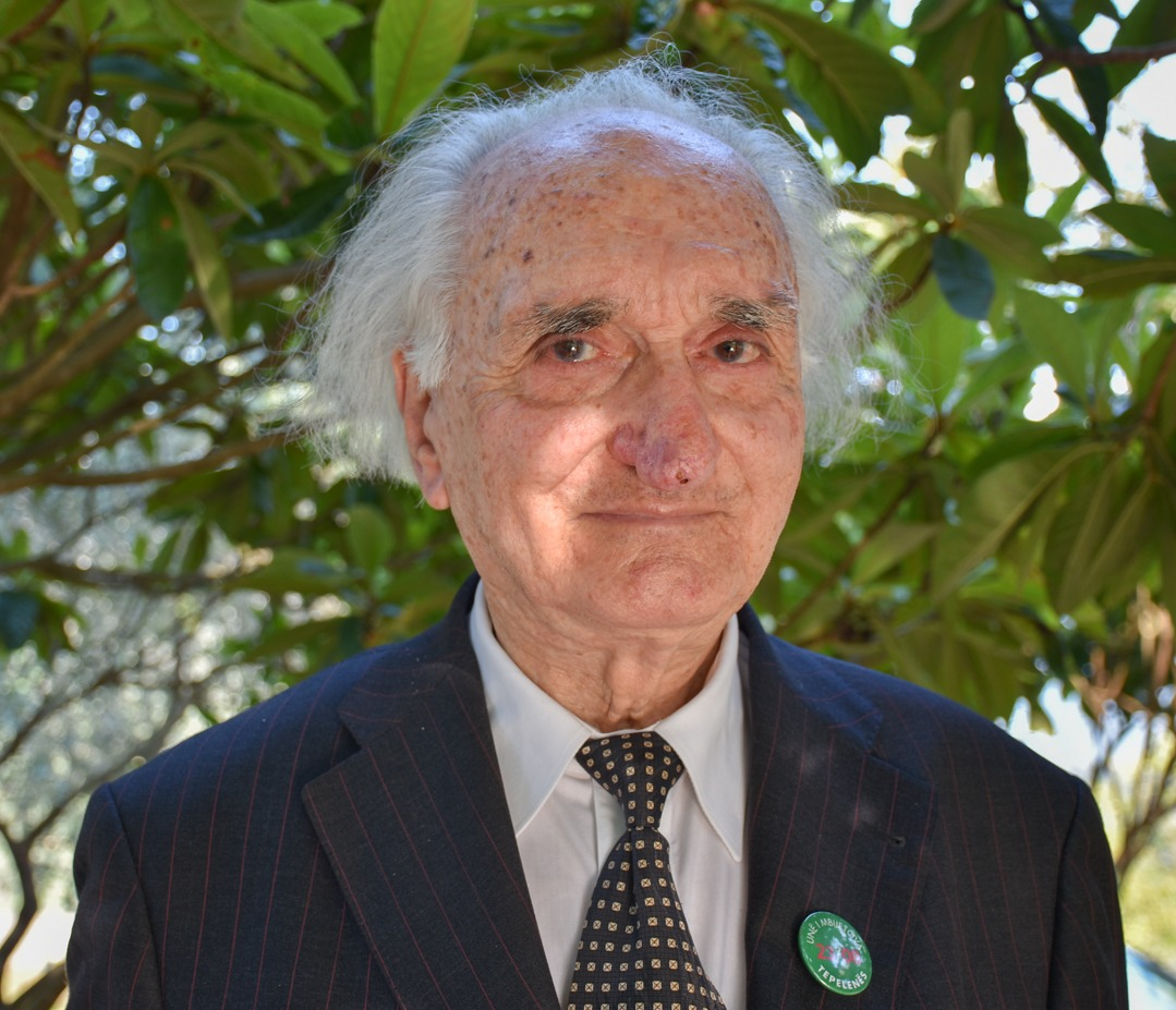 Lek Pervizi fotografuar nga Loreta Cuka.